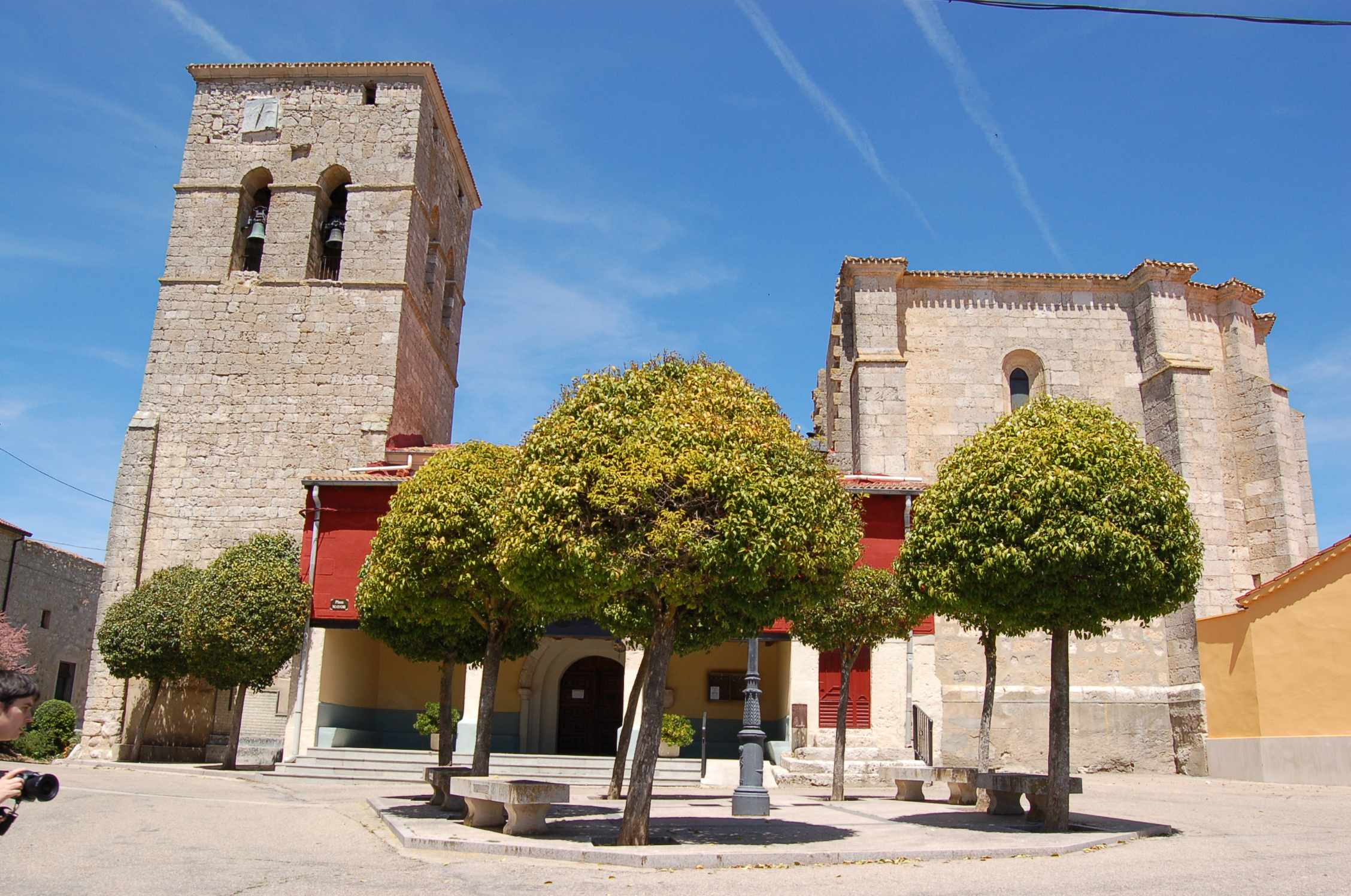 Igrexa de Villaescusa de Roa